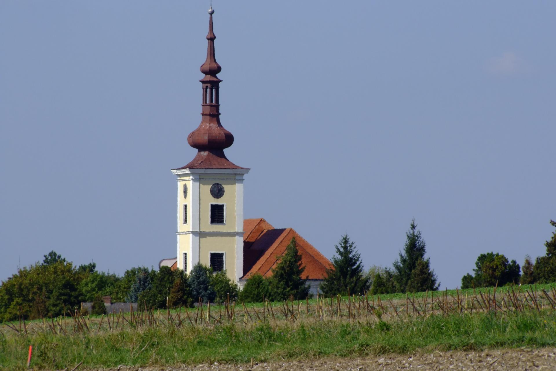 Kath. Pfarrkirche Hl. Kreuz